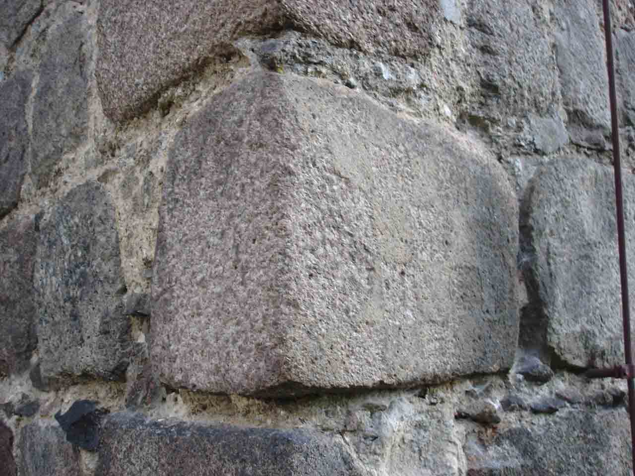 Nærbillede af skakbrætsten 2 i SØ-hjørnet af Neuendorf kirke (im Sande) - stenen har kun mønster på én side